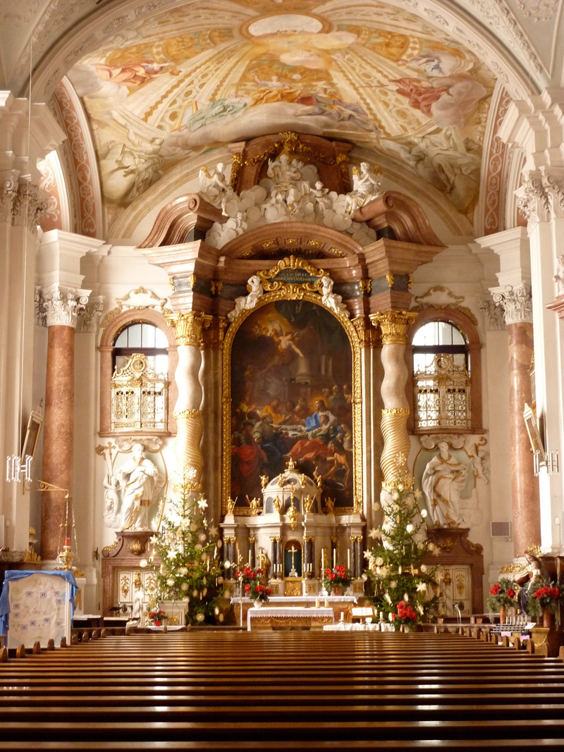 Innenansicht Hauptaltar der Klosterkirche in Michelfeld, Bayern, Deutschland